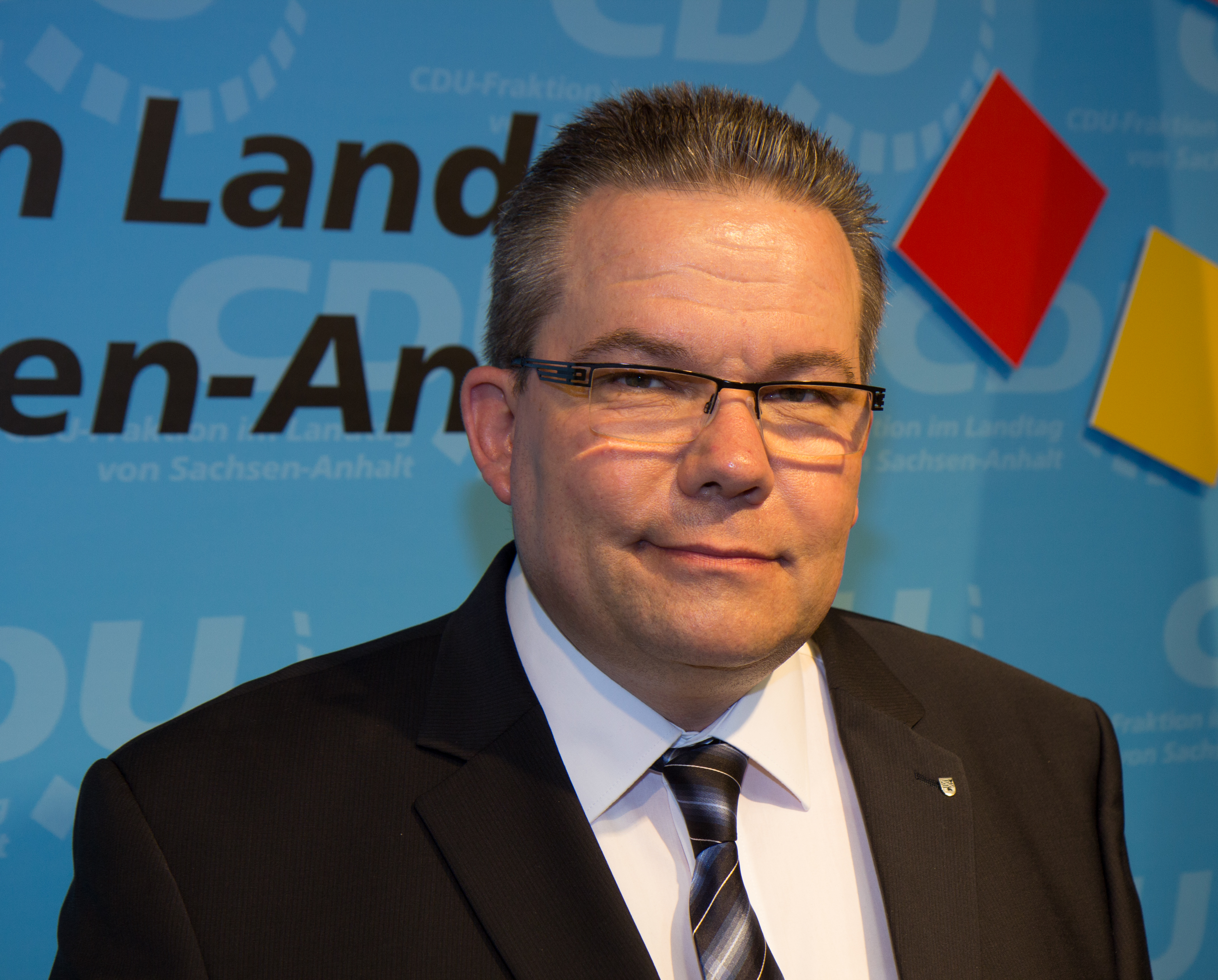 Jens Diederichst